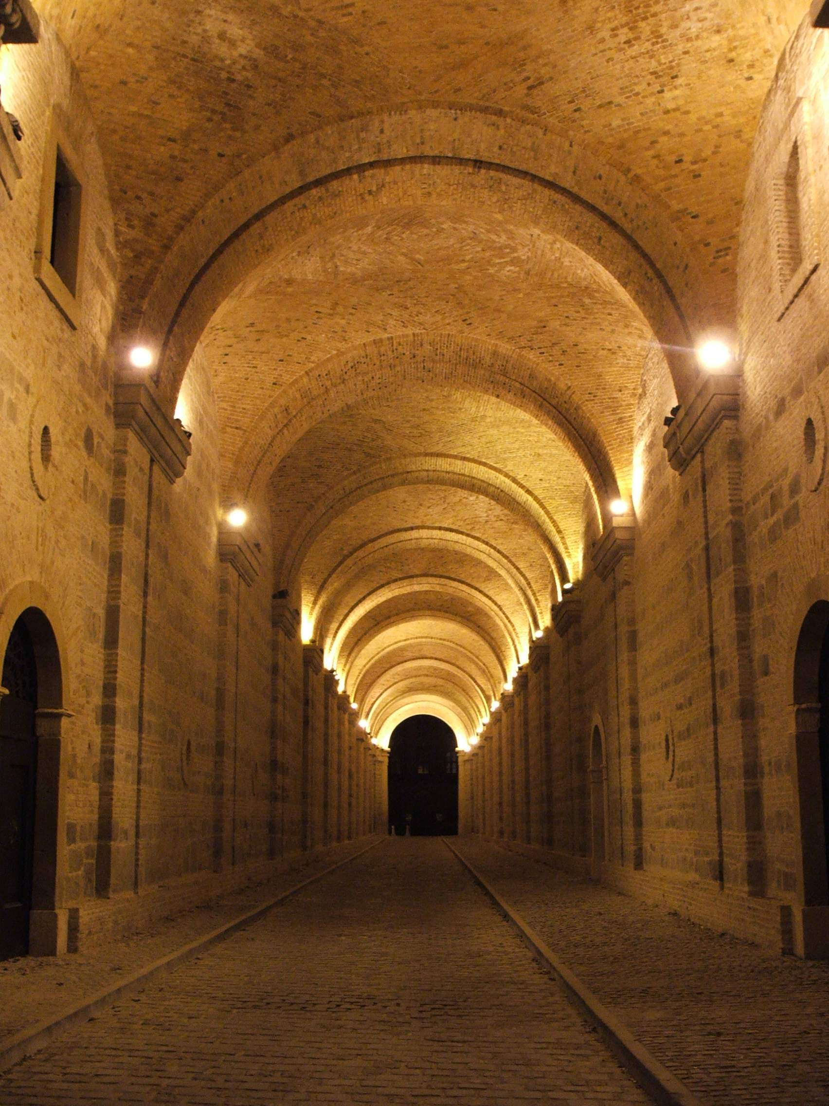 Sötétkapu 2010-ben elkészült kivilágítása